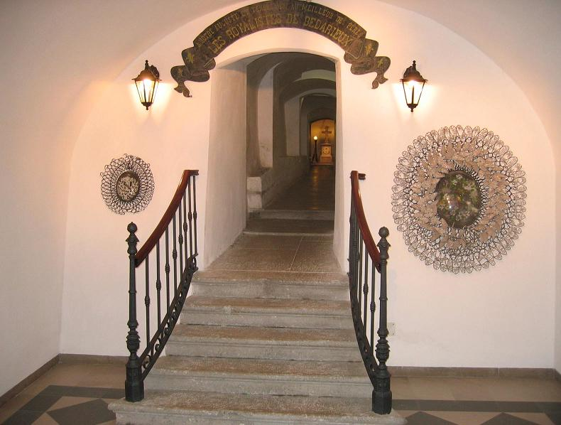 Bourbonska grobnica v frančiškanskem samostanu na Kostanjevici pri Novi Gorici.